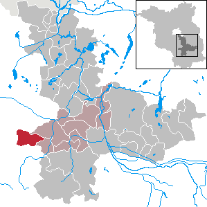 Steinreich in Brandenburg (Country) - District Dahme-Spreewald